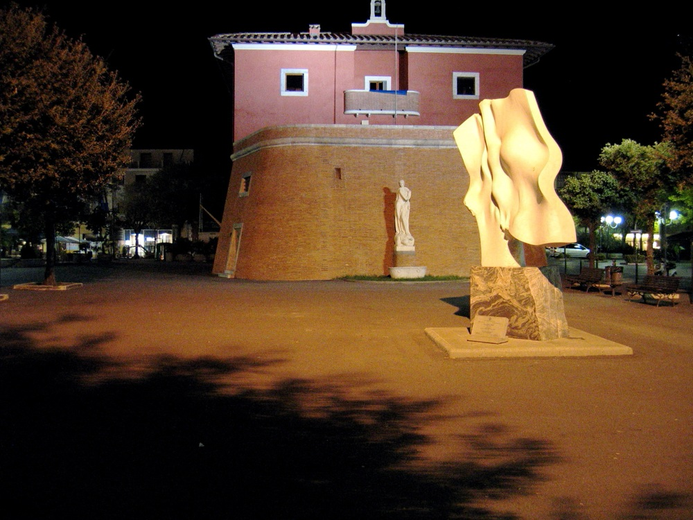 Moderm monument, Forte dei Marmi, Italy